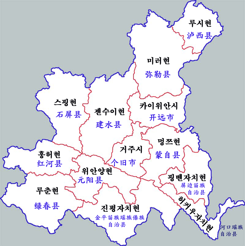 훙허하니족이족자치주 현급구역